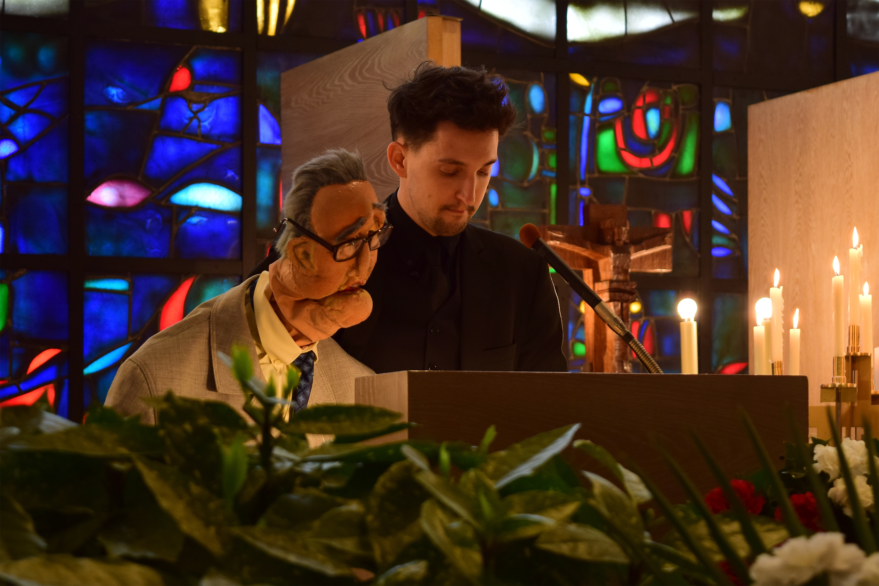 Verabschiedung des am 20. Februar 2015 verstorbenen Spiegelgrund-Überlebenden und Zeitzeugen Friedrich Zawrel in der Feuerhalle Simmering am 16. März 2015. Redner waren sein Retter und Freund Werner Vogt, Stadträtin Sonja Wehsely, Justizminister Wolfgang Brandstetter und der Puppenspieler und Zawrels Freund Nikolaus Habjan, der Zawrels Geschichte in dem preisgekrönten Puppenspiel "F. Zawrel – Erbbiologisch und sozial minderwertig" verarbeitet hat und laufend aufführt; die Handpuppe sprach in Habjans Rede alle von ihm erwähnten Zitate Zawrels.